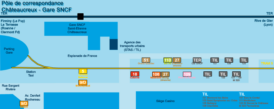 Pôle Multimodal de St Etienne Chateaucreux